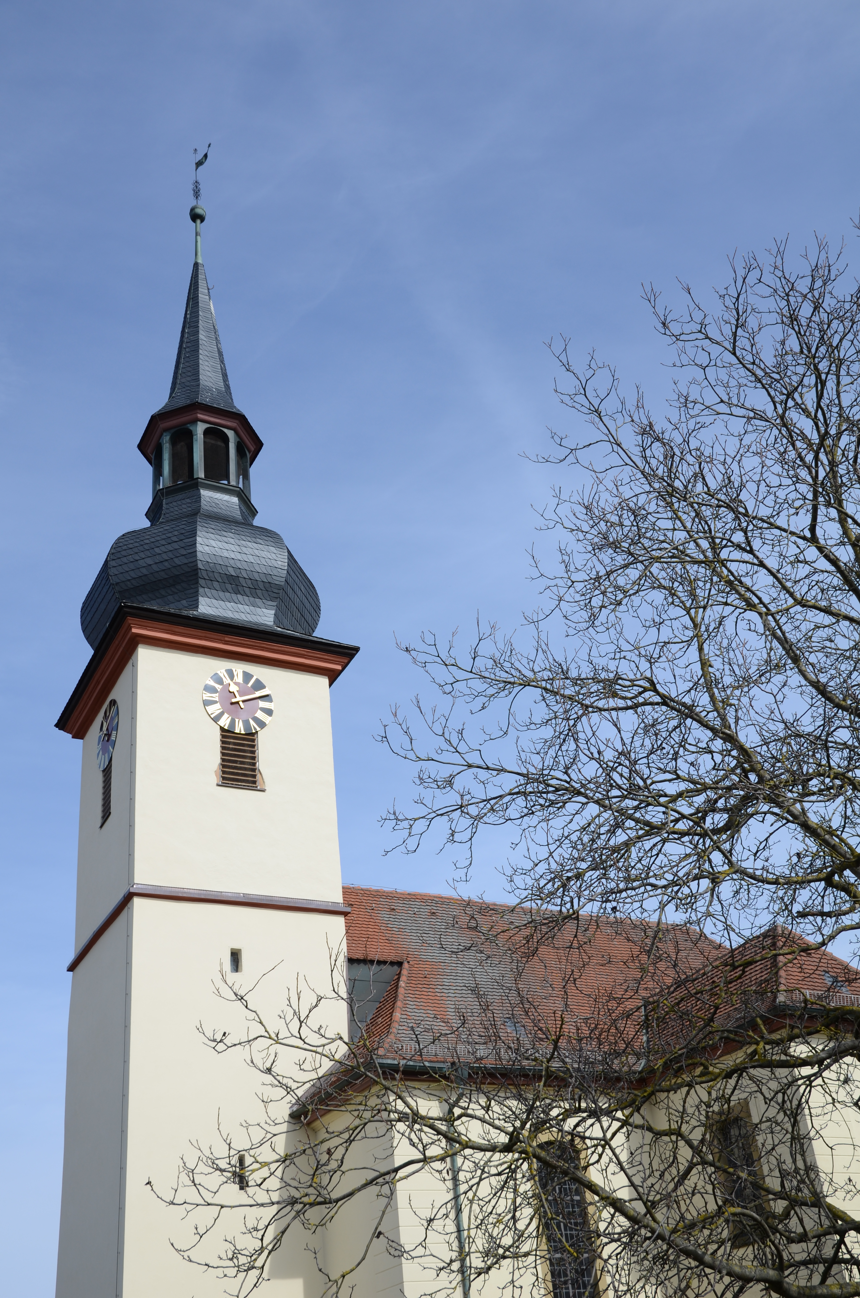 Evang.-Luth. Kirche St. Martin in Welbhausen